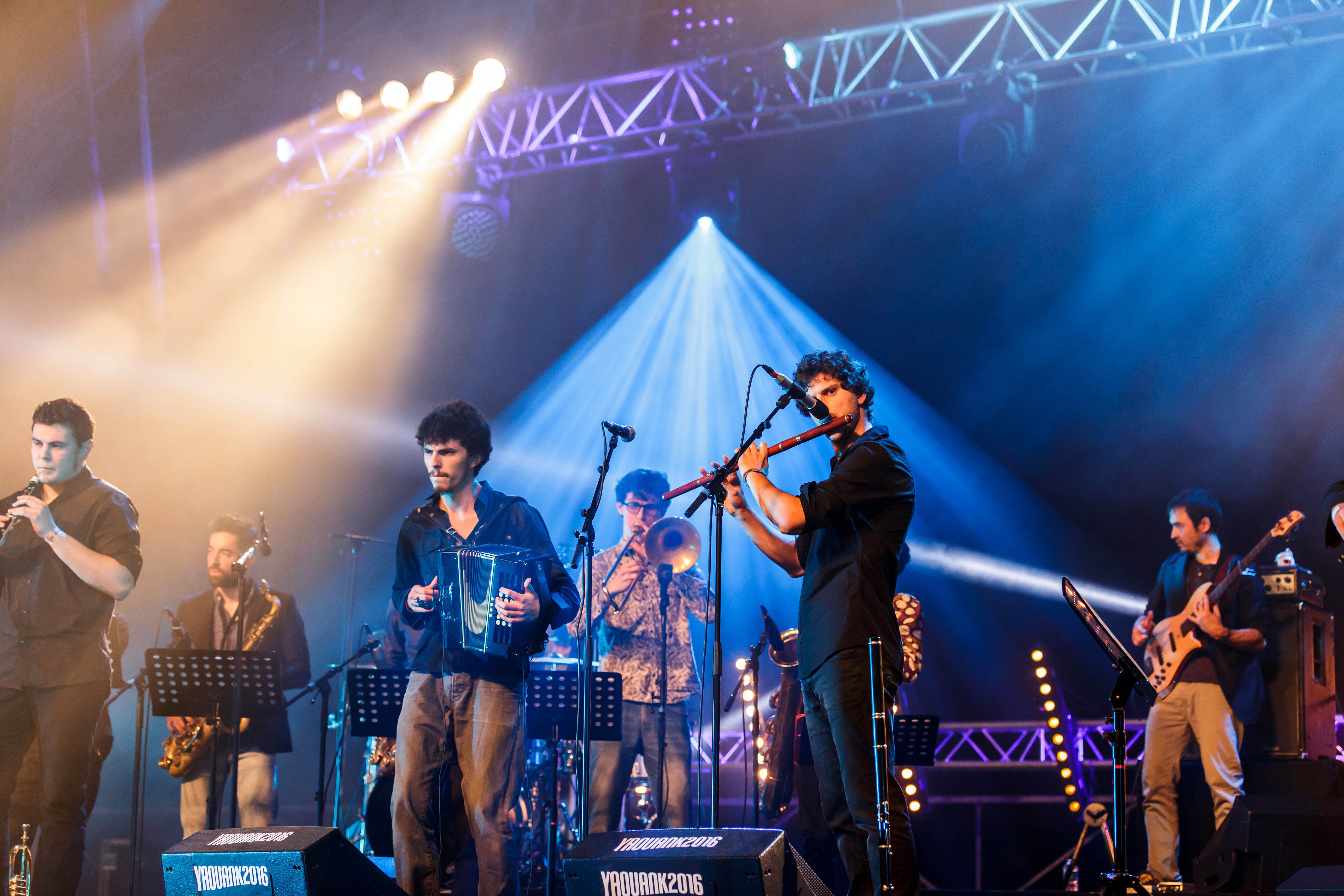 Nâtah Big Band en fest-noz lors du festival Yaouank le 19 novembre 2016 au MusikHall du Parc Expo de Rennes.